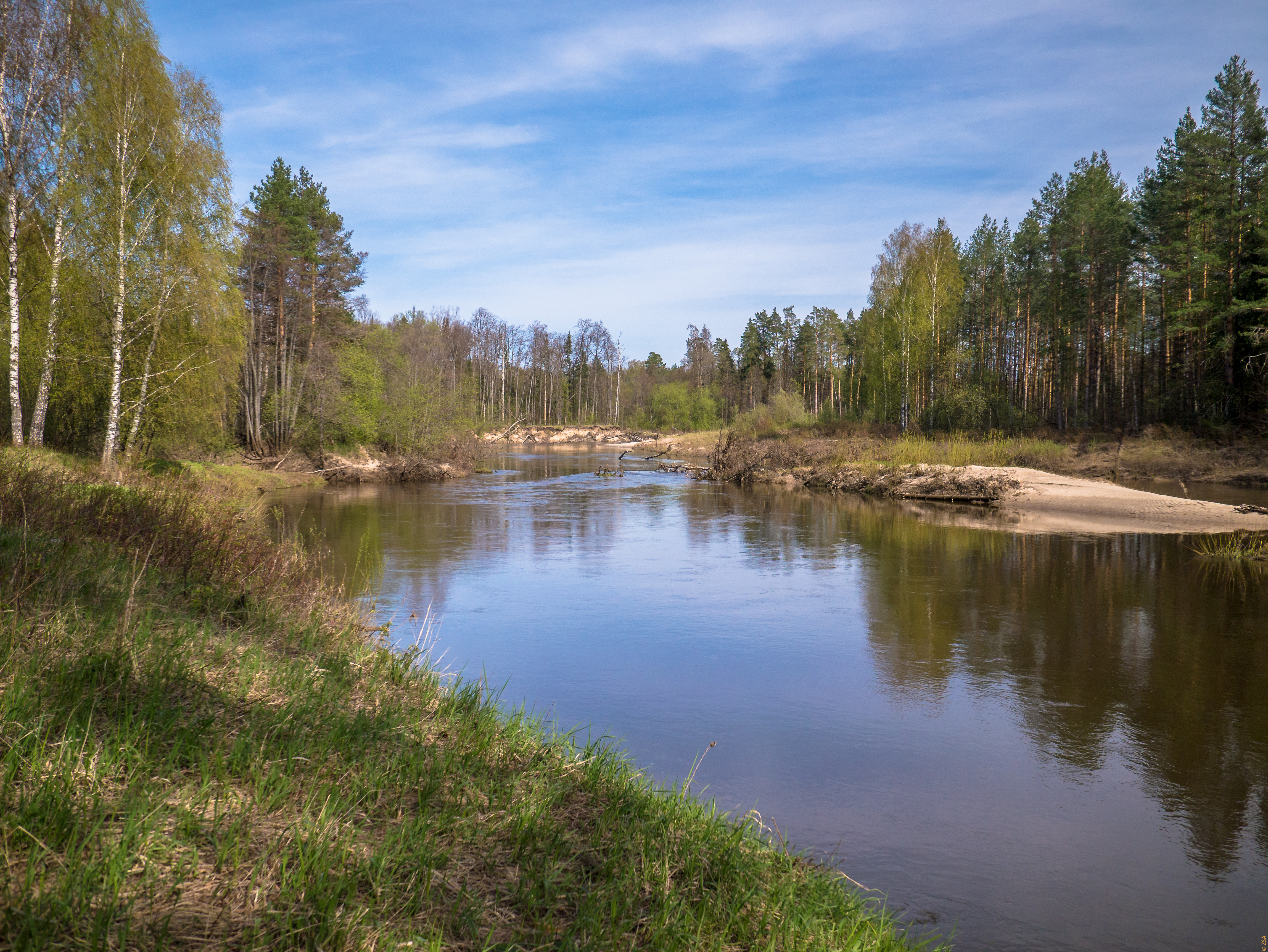 Устье-Кундышский заказник, Медведевский район This image is related to the protected area of Russia number 1210052